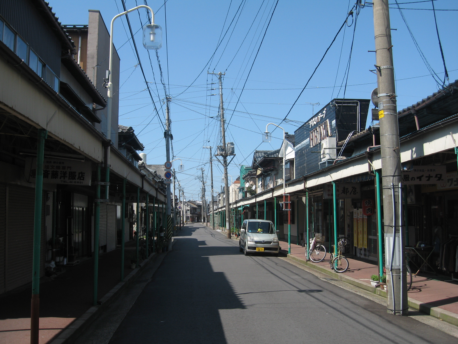 平日における沼垂東四丁目の様子。